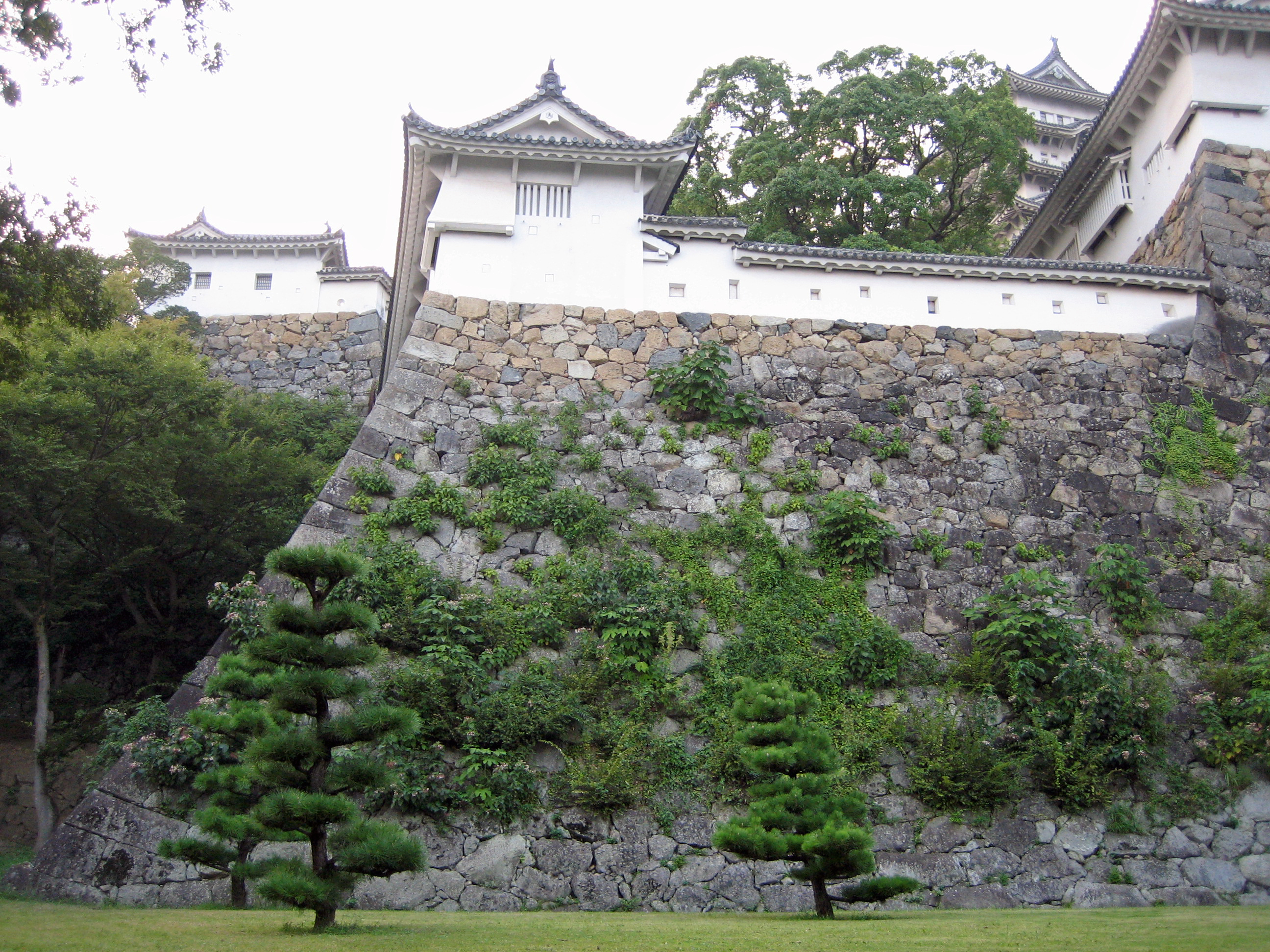 姫路城井戸曲輪を下から見上げて撮影した写真。左の櫓は帯郭櫓そして右側は帯の櫓。